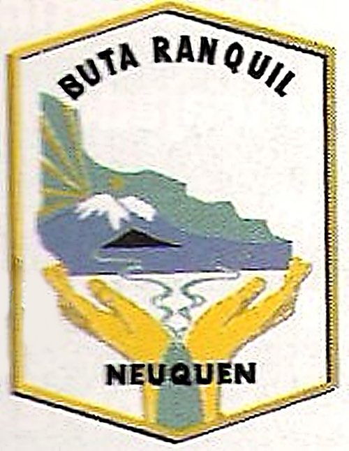 Escudo de la localidad de Buta Ranquil.